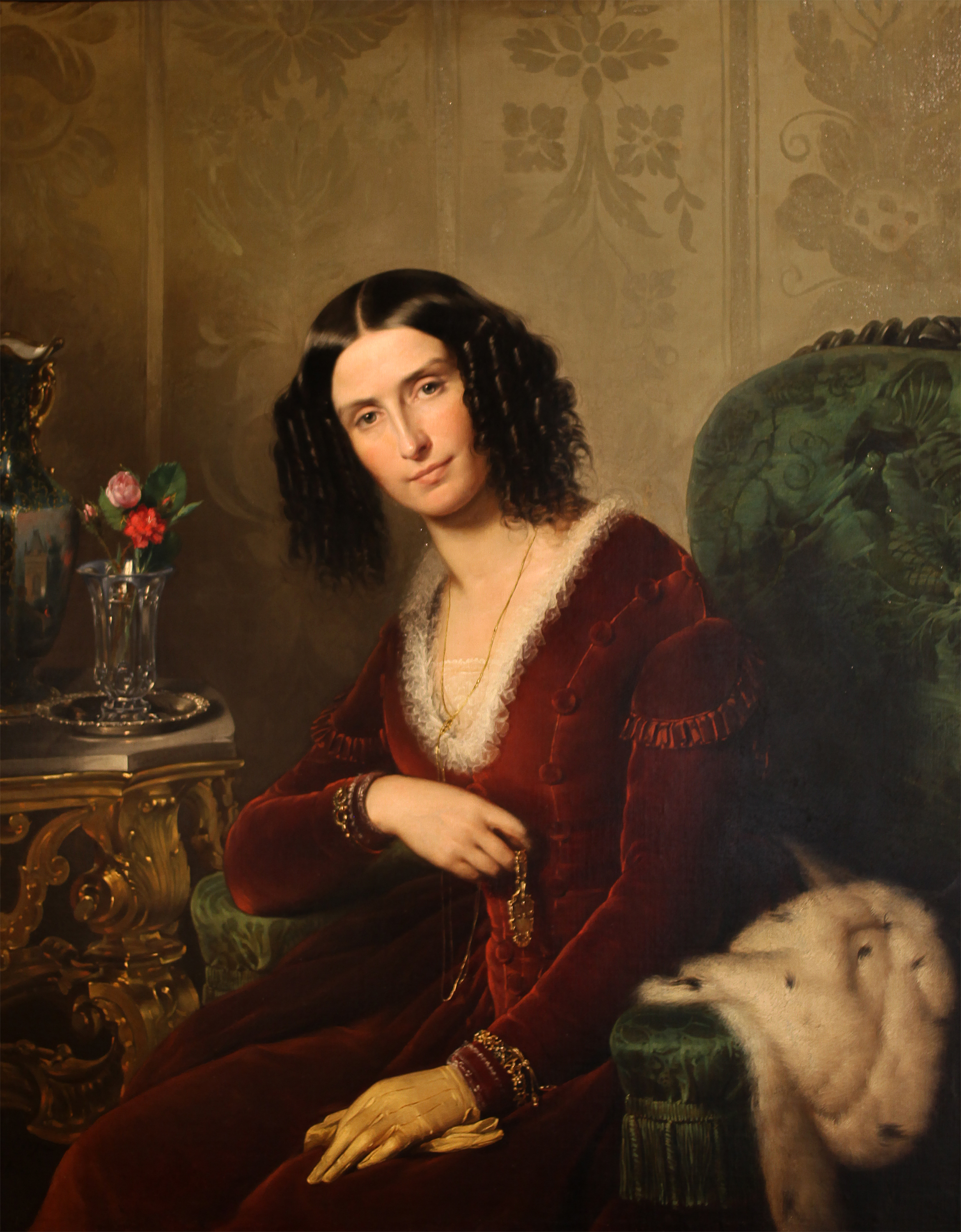 Eliseo Sala (1813-1879) Ritratto della marchesa Luisa d'Azeglio Blondel Maumery (1844 ca.) Galleria d'Arte Moderna di Milano - Copia